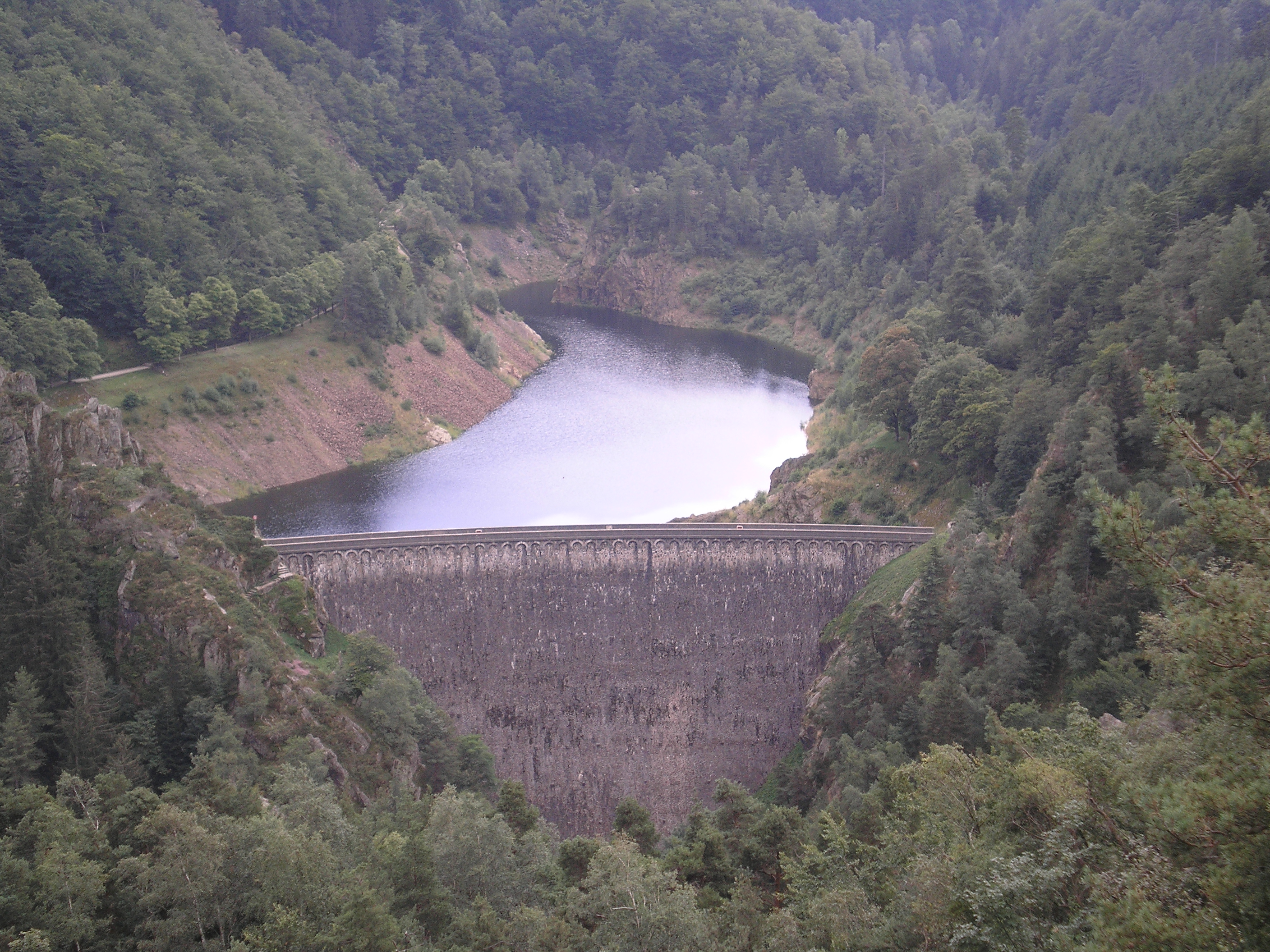 Barrage du Gouffre d'Enfer, sur les communes de Rochetaillée et Planfoy, près de Saint-Etienne, département de La Loire, France